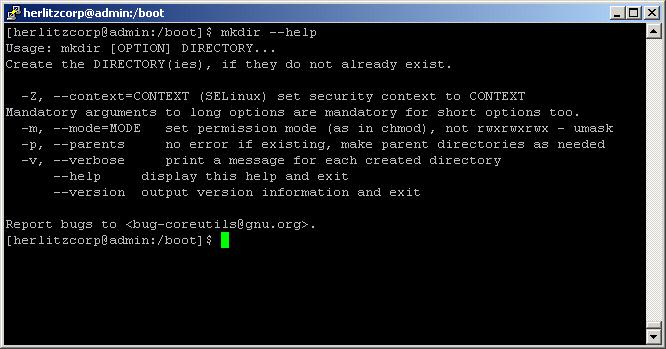 salida comando mkdir -h